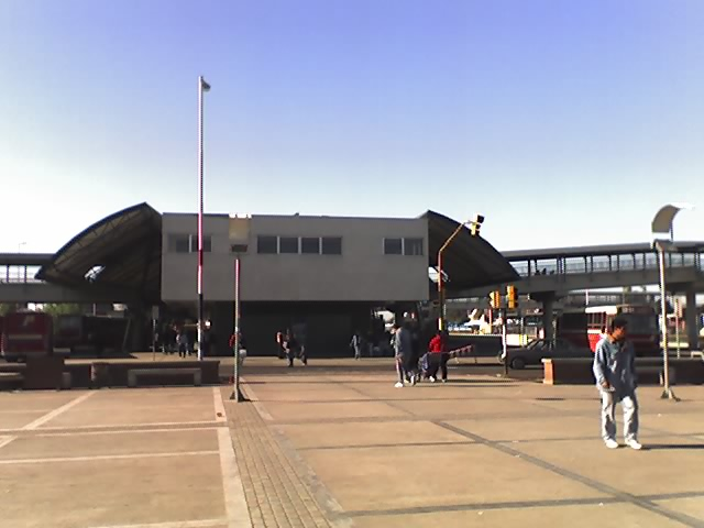 Centro de transbordo de la ciudad de Moreno, provincia de Buenos Aires, Argentina.